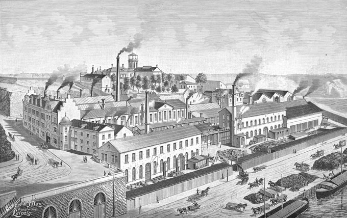 Ludvigsbergs verkstad med fabrikörsvillan (Ludvigsbergsvillan eller Lammskavillan) på höjden.